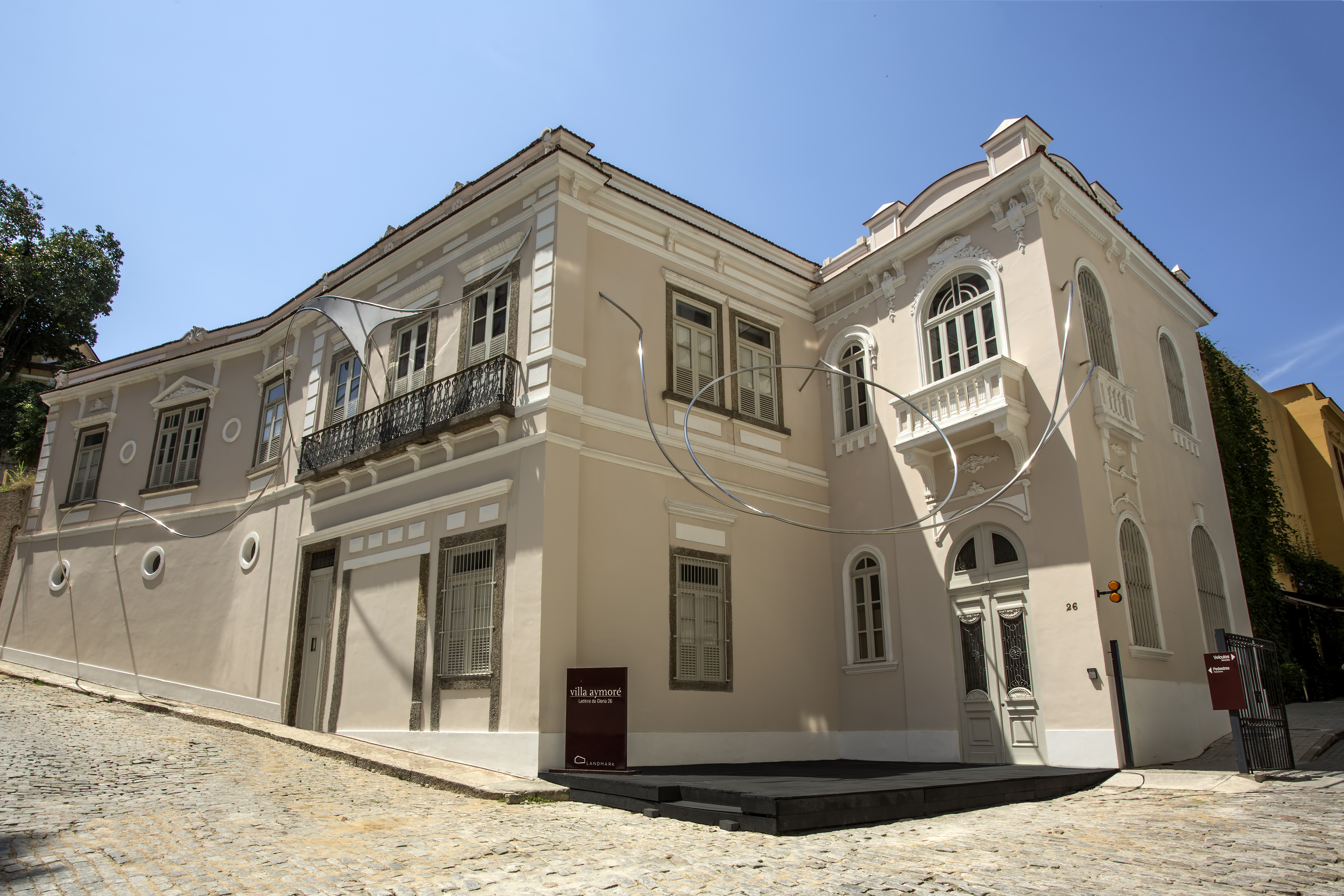 Vista completa da instalação da artista Iole de Freitas, e entrada para a Villa Aymoré.